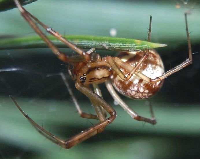 Linyphia triangularis, female